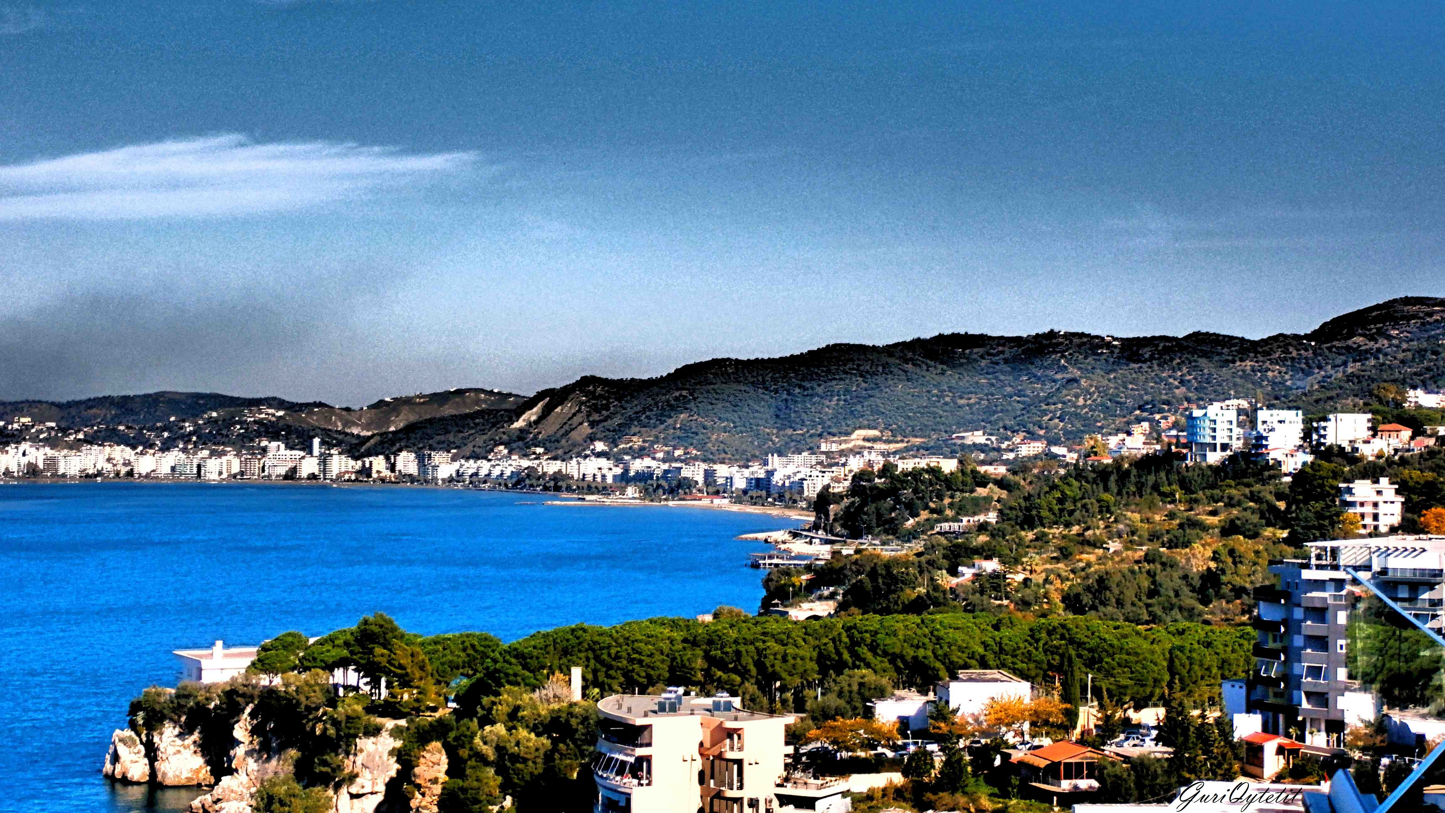 Vlorë, Albania